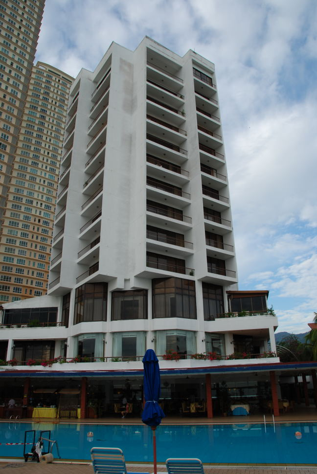 Taman Tanjung Bunga, Tanjung Bungah, Pulau Pinang, Malaysia